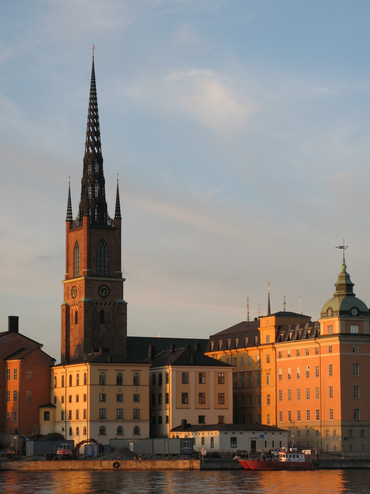 Östra Gymnasiehuset i senter av bilden. I bakgrunden Riddarholmskyrkan.